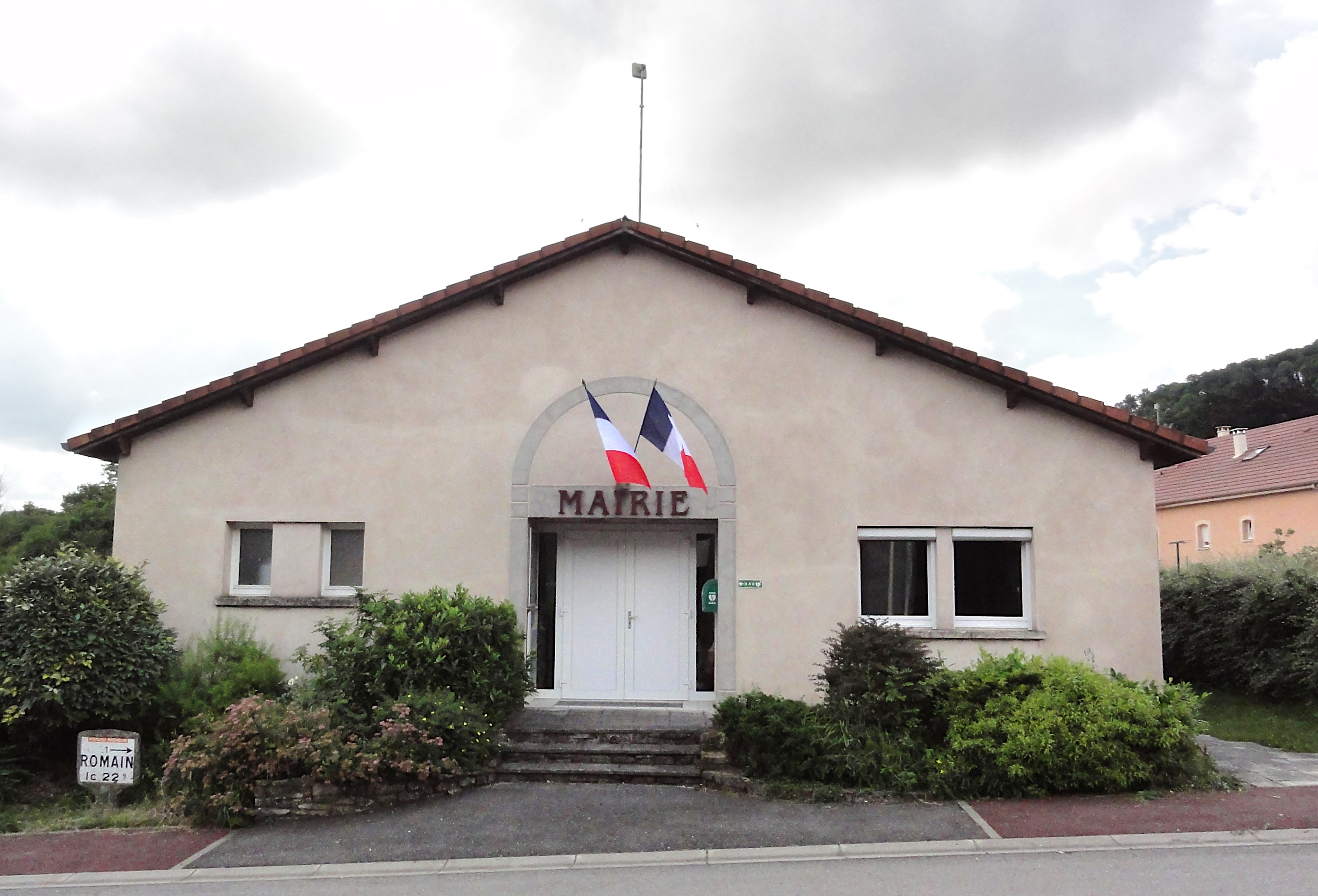 Romain (M-et-M) mairie